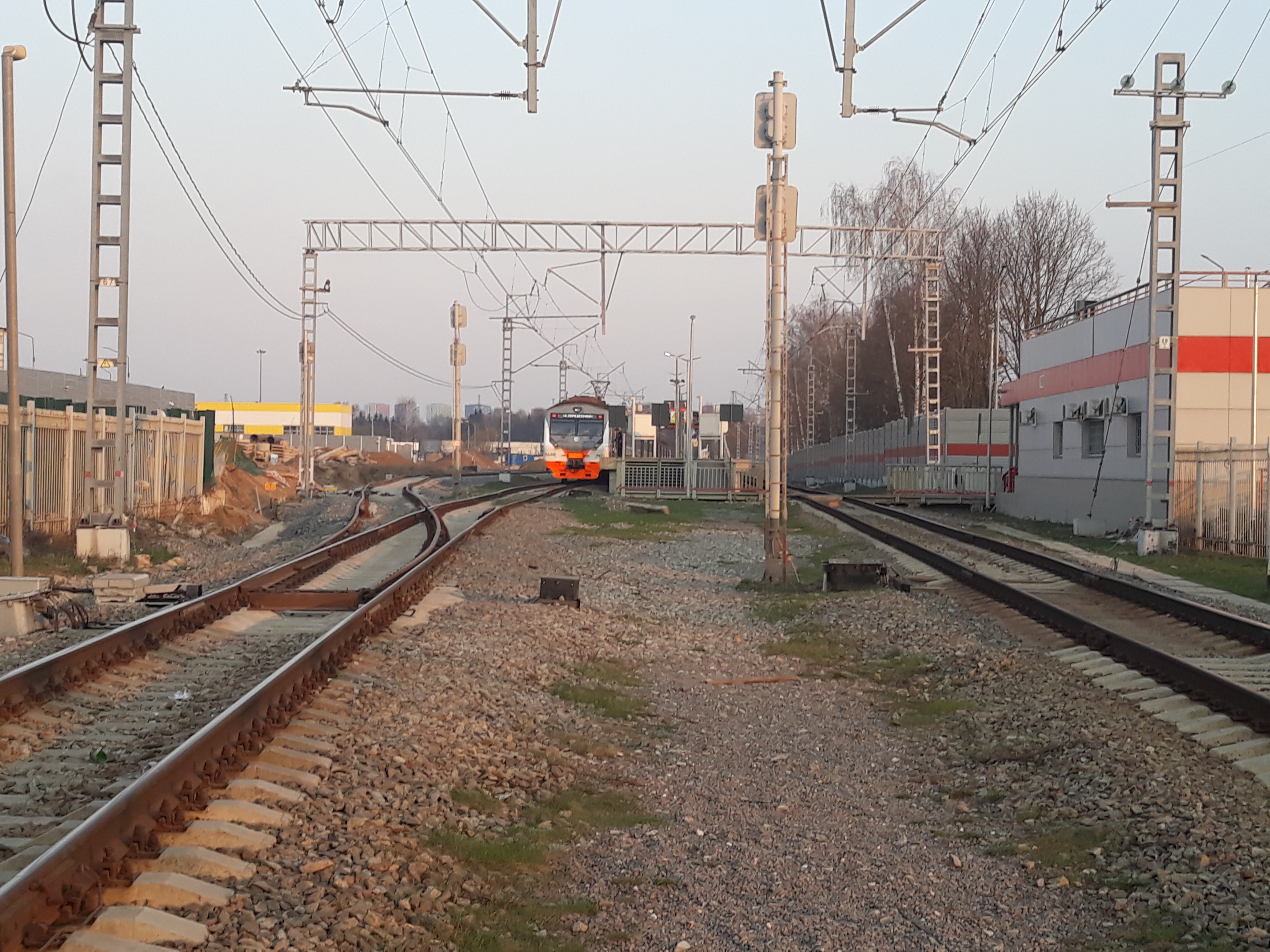 Станция «Новопеределкино», вид со стороны перехода через пути